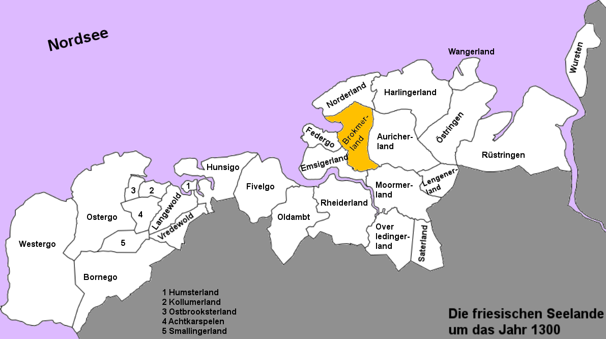 Karte der freien friesischen Seelande (Landesgemeinden) von der Zuiderzee bis zur Weser in den Grenzen um das Jahr 1300. Brokmerland hervorgehoben. (Karte ohne Inseln.)